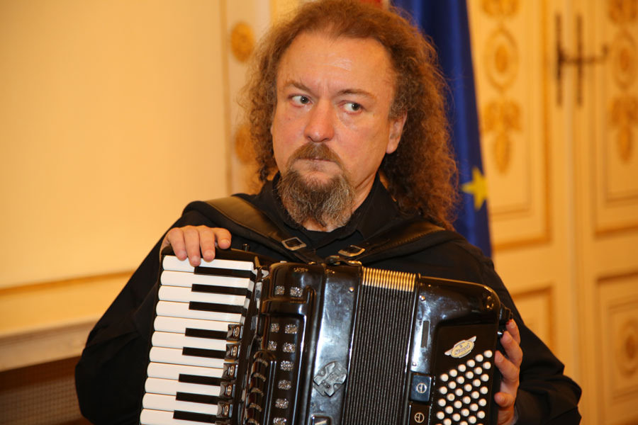 Krzysztof Dobrek-8517